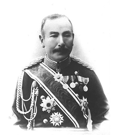 永山武四郎(Nagayama Takeshiroh,1837-1904)